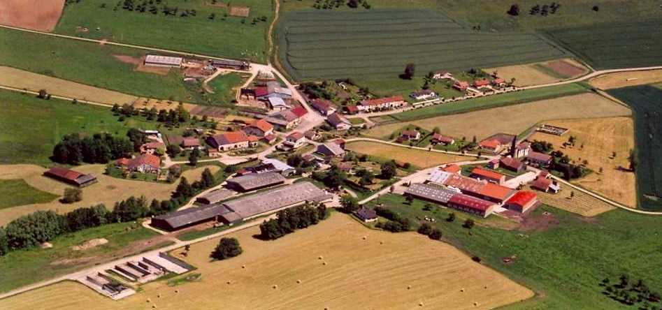 Vue du village